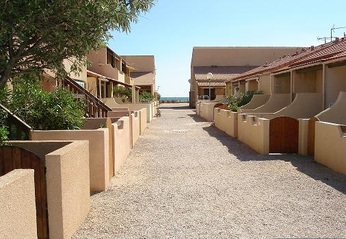 Quartier "Grande bleu" à Leucate (Aude)